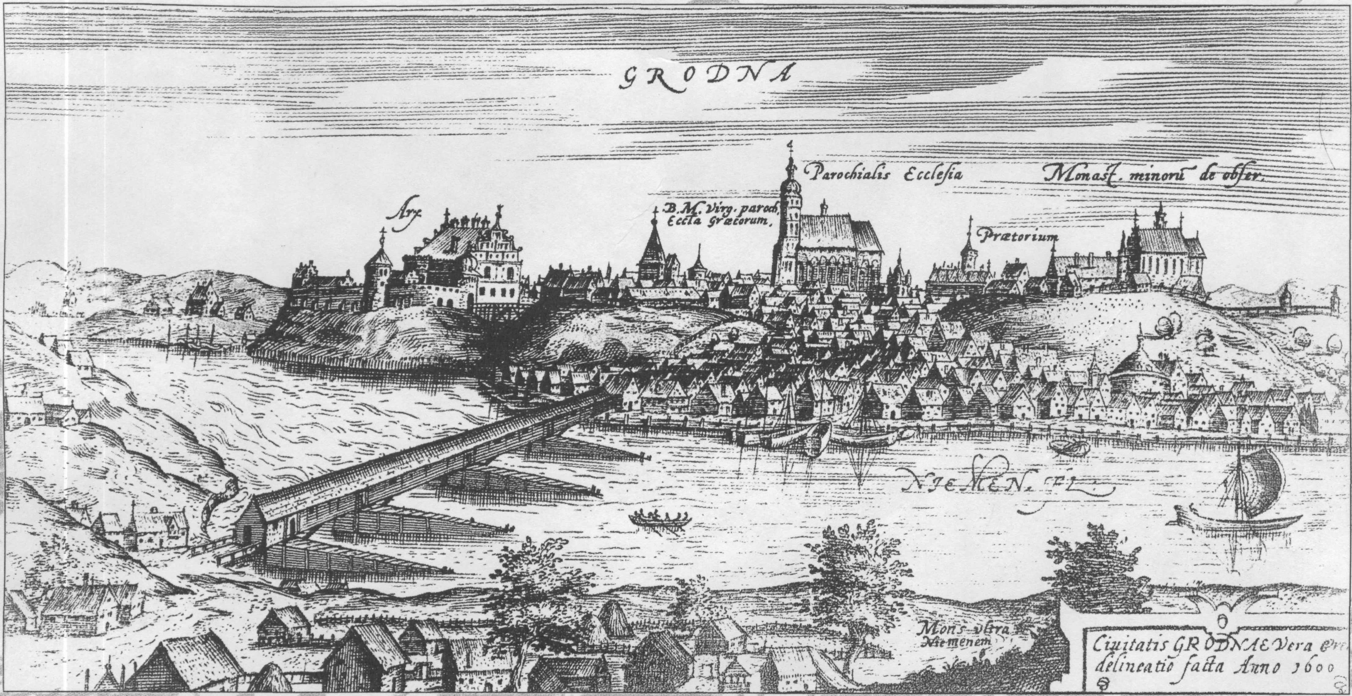 Гравюра Тамаша Макоўскага